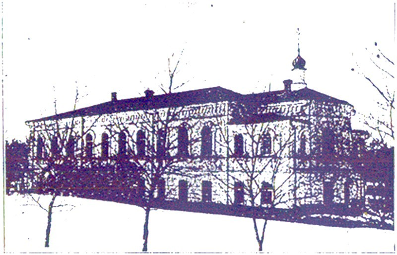 Трапезная церковь во имя преподобного Серафима Саровского. Ключегорский Казанско-Богородицкого монастырь, Бузулукский уезд Самарской губернии